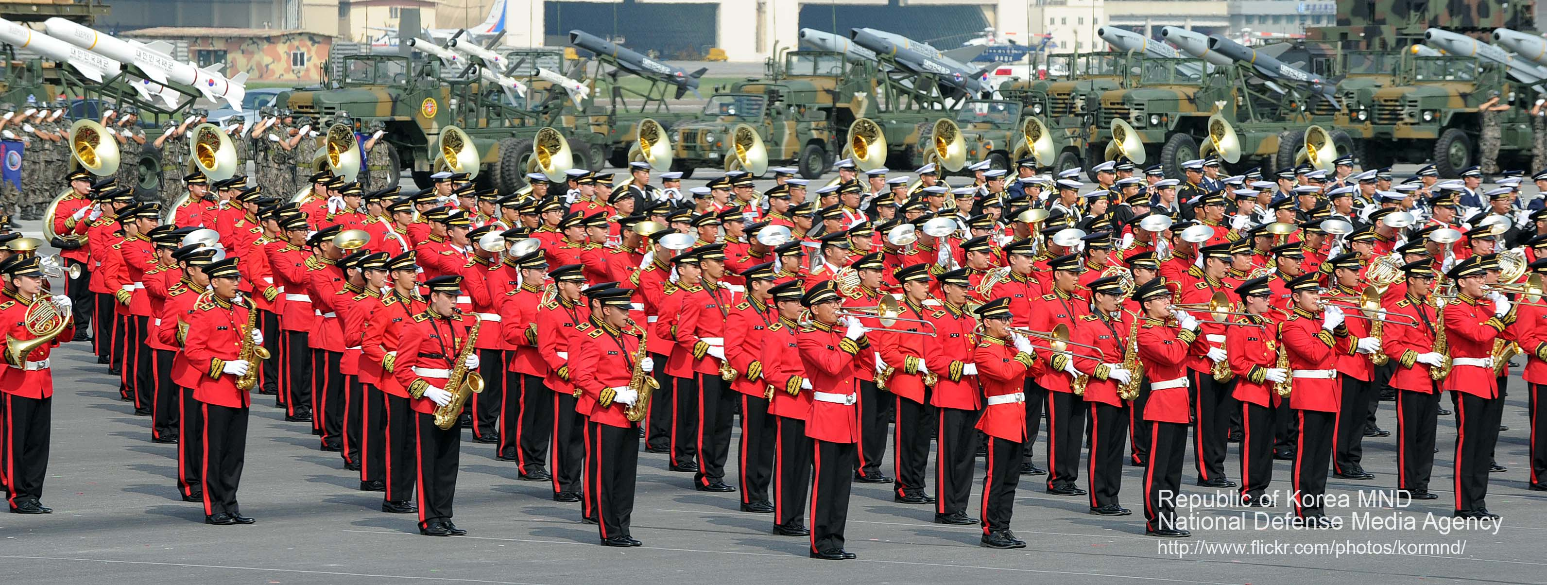 촬영 - 김태형 기자